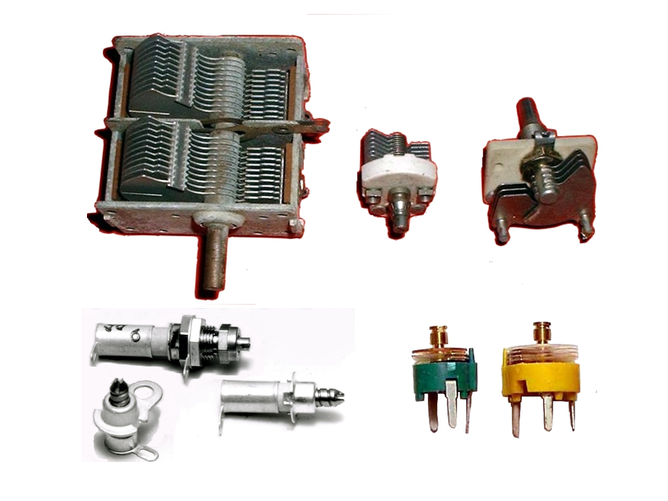 Dreh- und Trimmkondensatoren